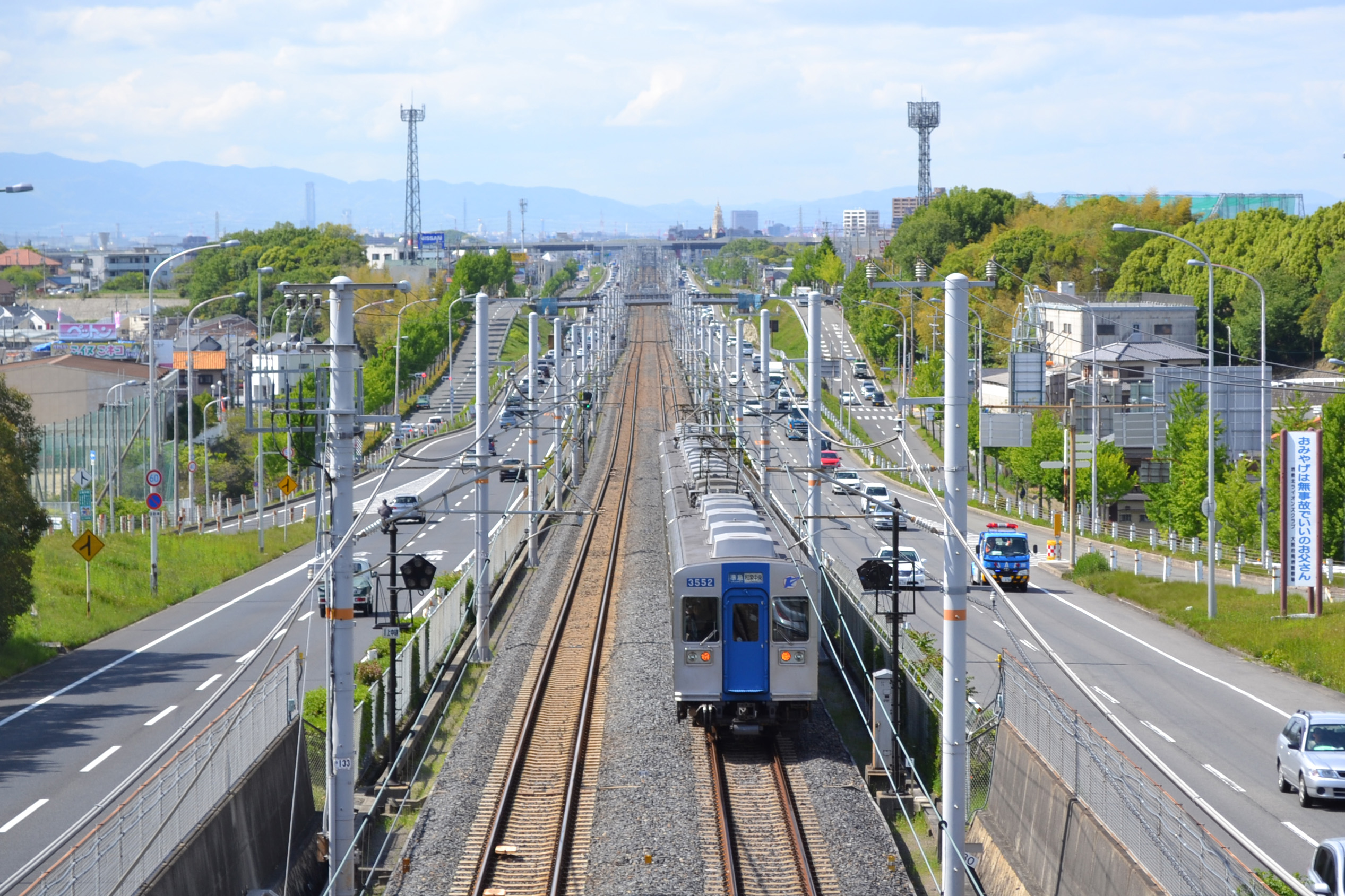 泉北高速鉄道線